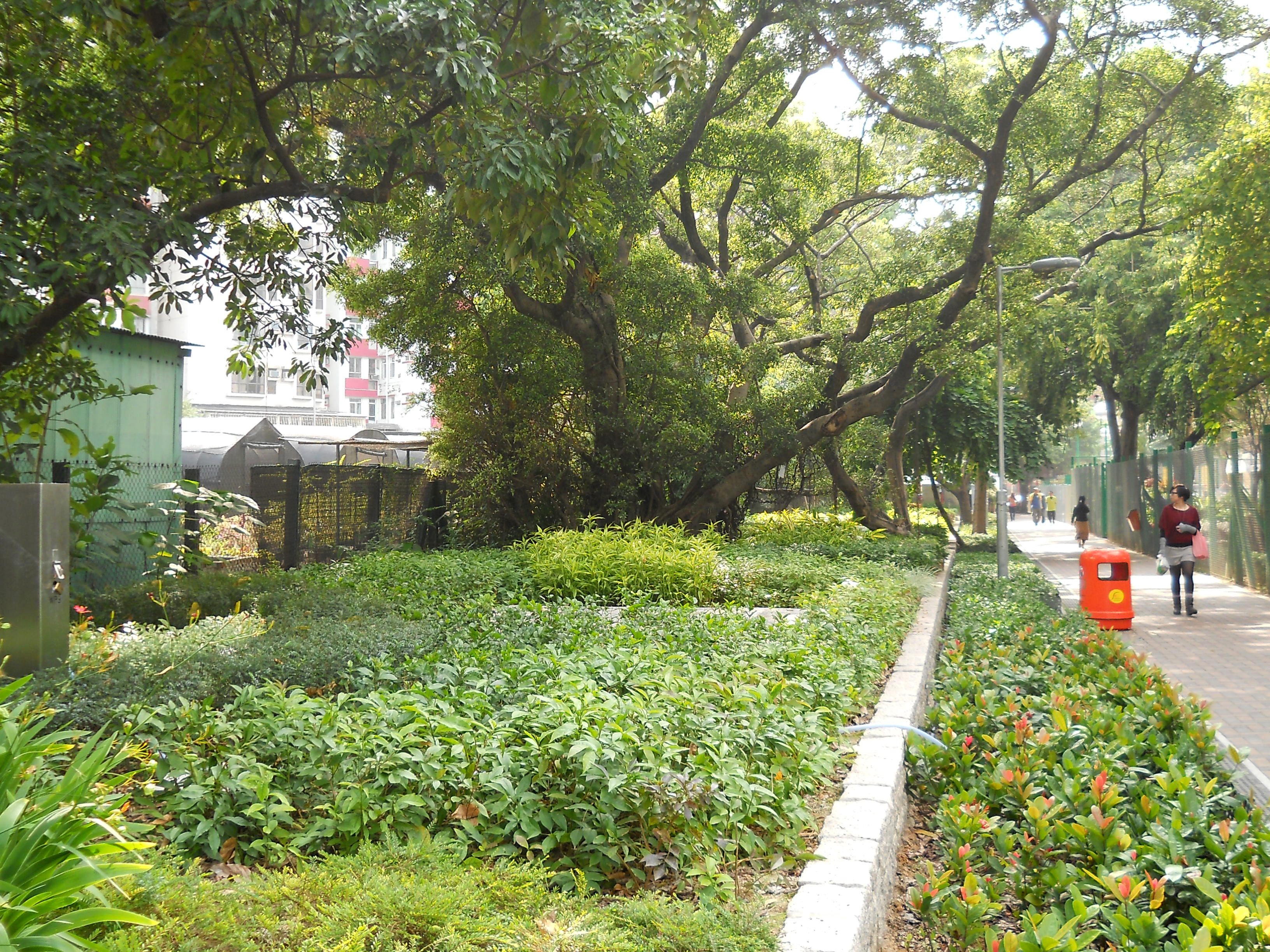 中文（香港）: 覆蓋及綠化後的花墟道明渠